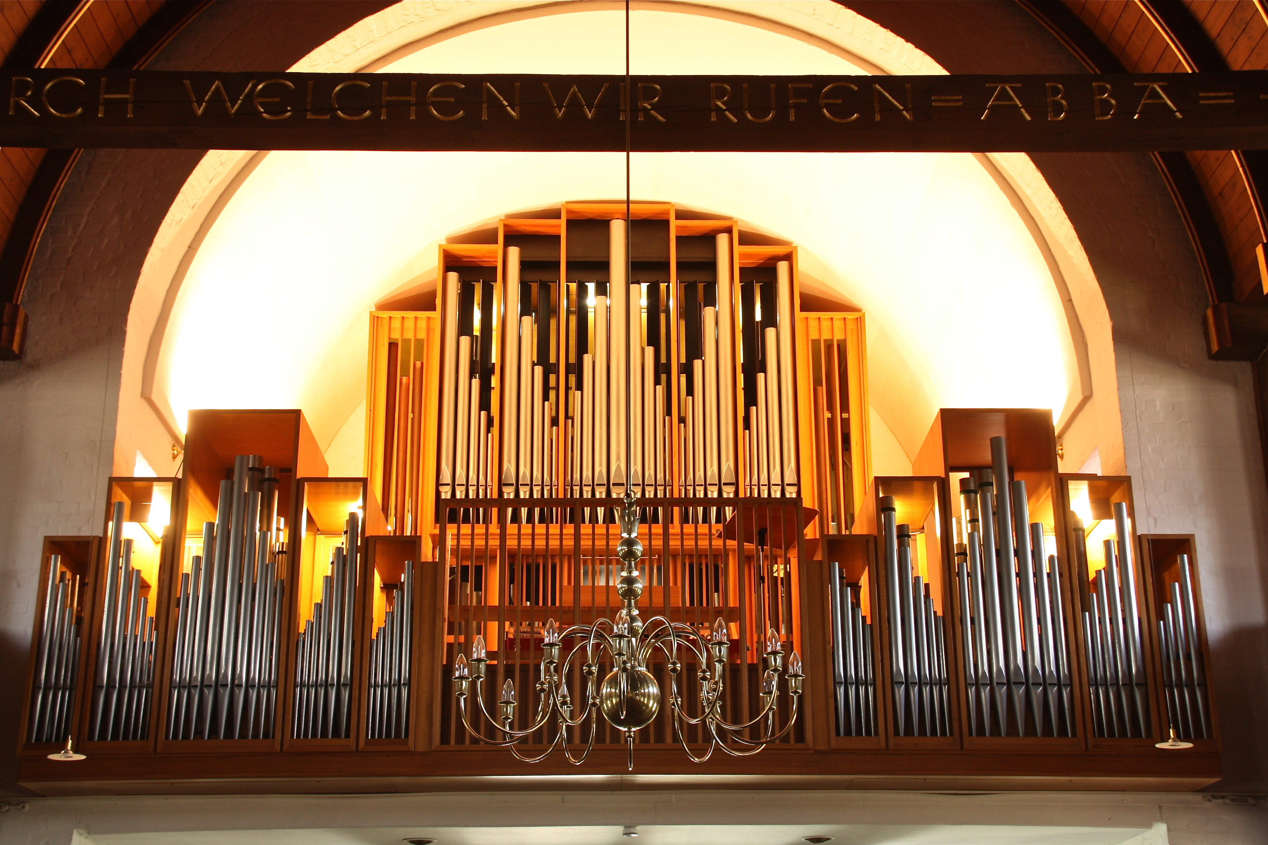 Hamburg, Wellingsbüttel, Lutherkirche, Innenraum, Orgelprospekt, Schuke-Orgel von 1962